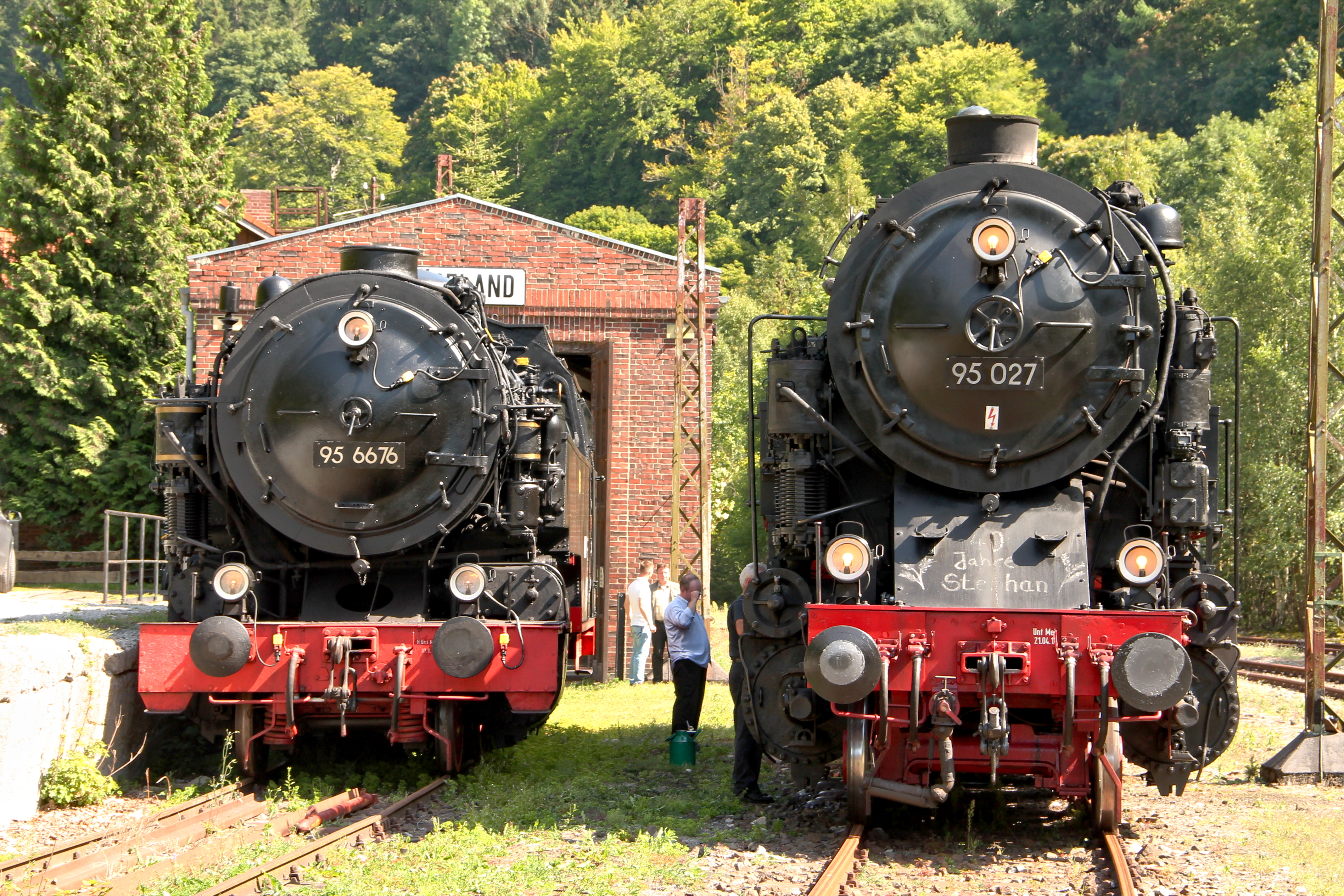 Dampflokomotiven 95 6676 der DR ex HBE »Mammut« (Borsig 10353/1919) und 95 027 (Hanomag 10185/1923), beide 1’E1’ h2t, in Rübeland Güterbahnhof am 19.August 2012